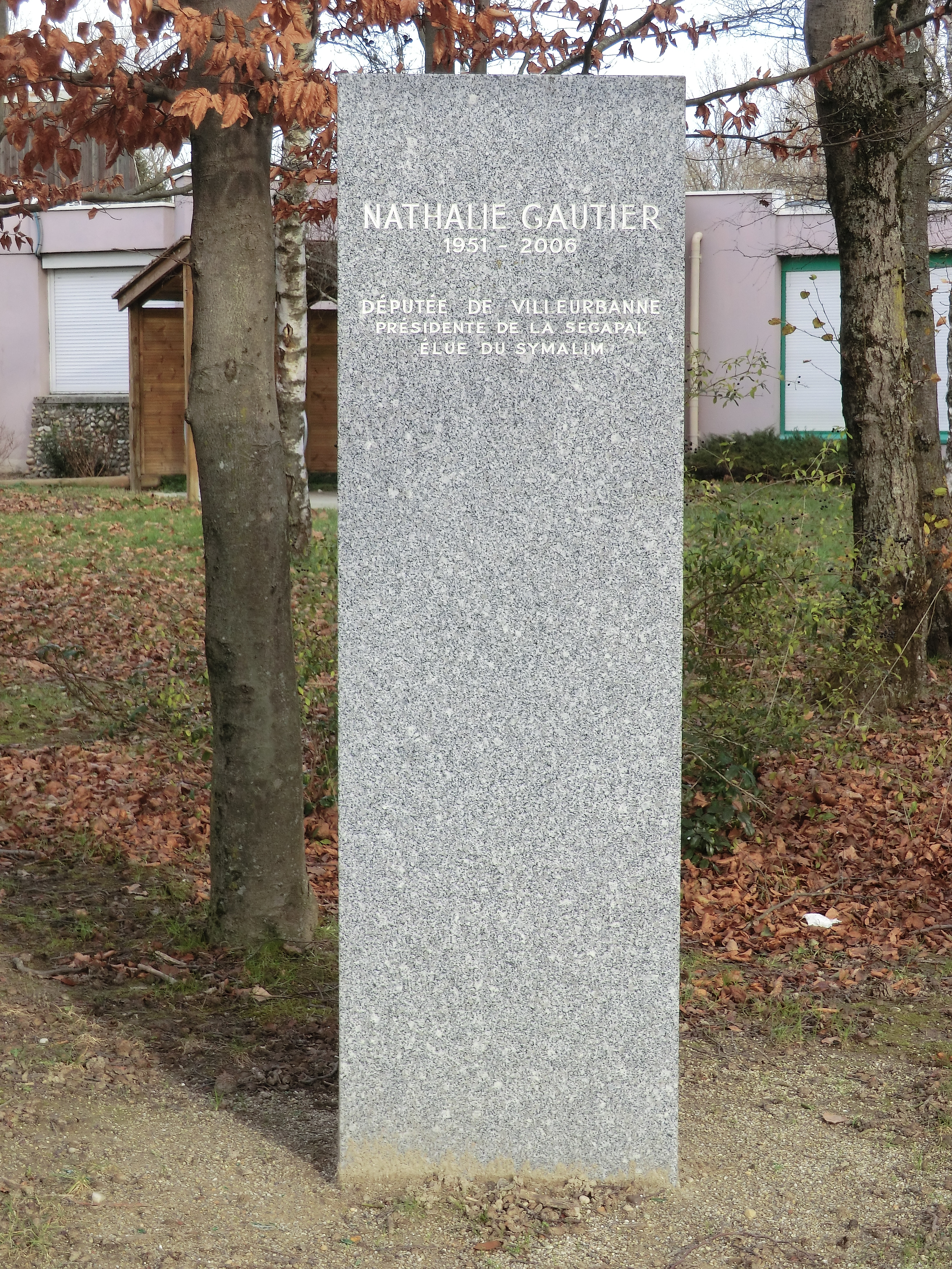 Stèle rendant hommage à Nathalie Gautier, à proximité du centre Nathalie-Gautier dans le Grand Parc de Miribel-Jonage. Est inscrit : Nathalie Gautier 1951 - 2006 Députée de Villeurbanne Présidente de la Segapal Elue du Symalim